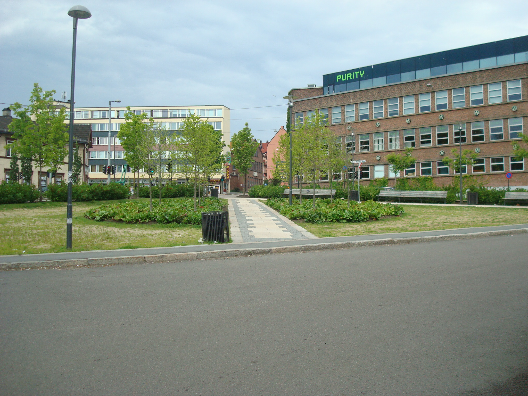 Jenny Braatens plass i Oslo.